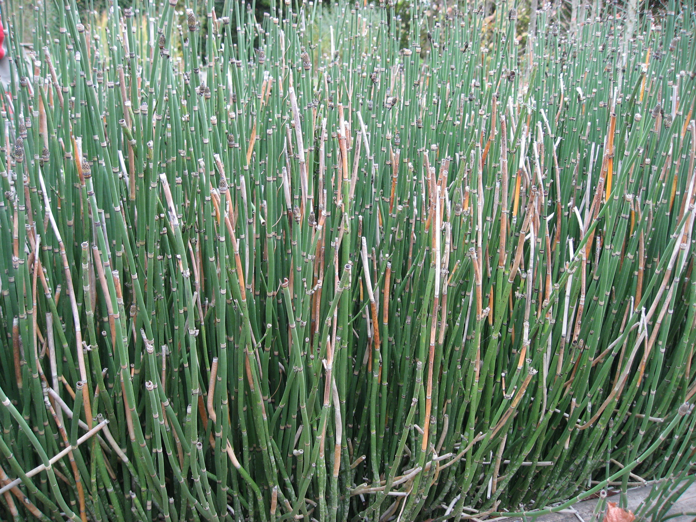 Equisetum hyemale in Conservatoire National des Plantes à Parfum Map: 48° 23' 49" N 2° 28' 45" E